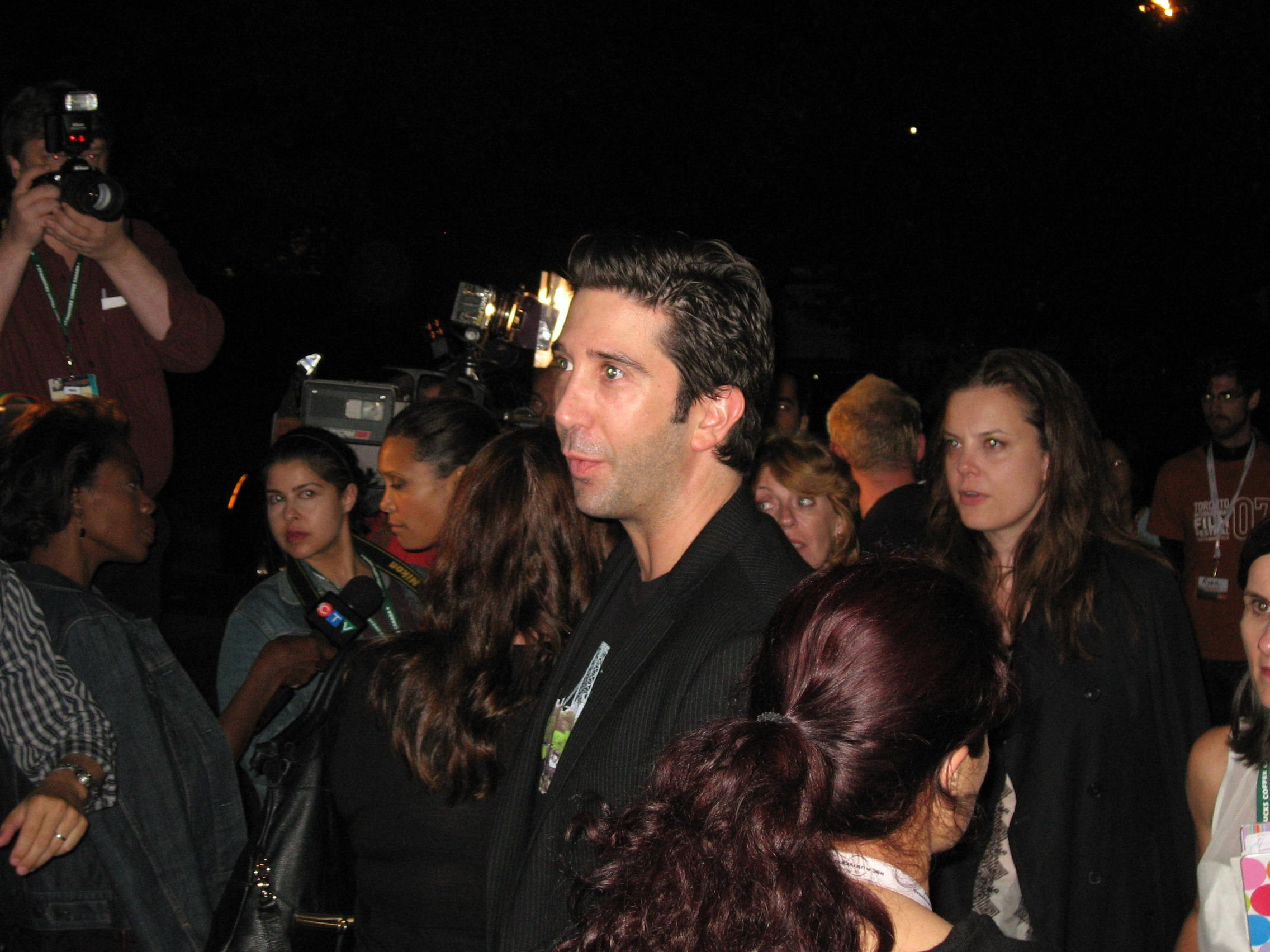 David SchwimmerDirector David Schwimmer